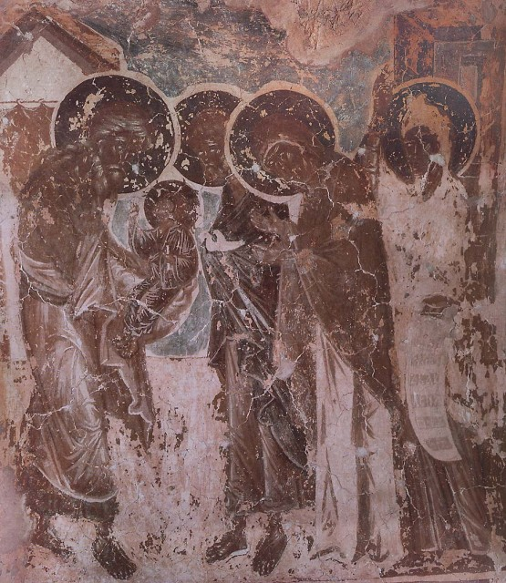 Стрэчанне. Фрэска. Успенская царква ў Мялётаве пад Псковам